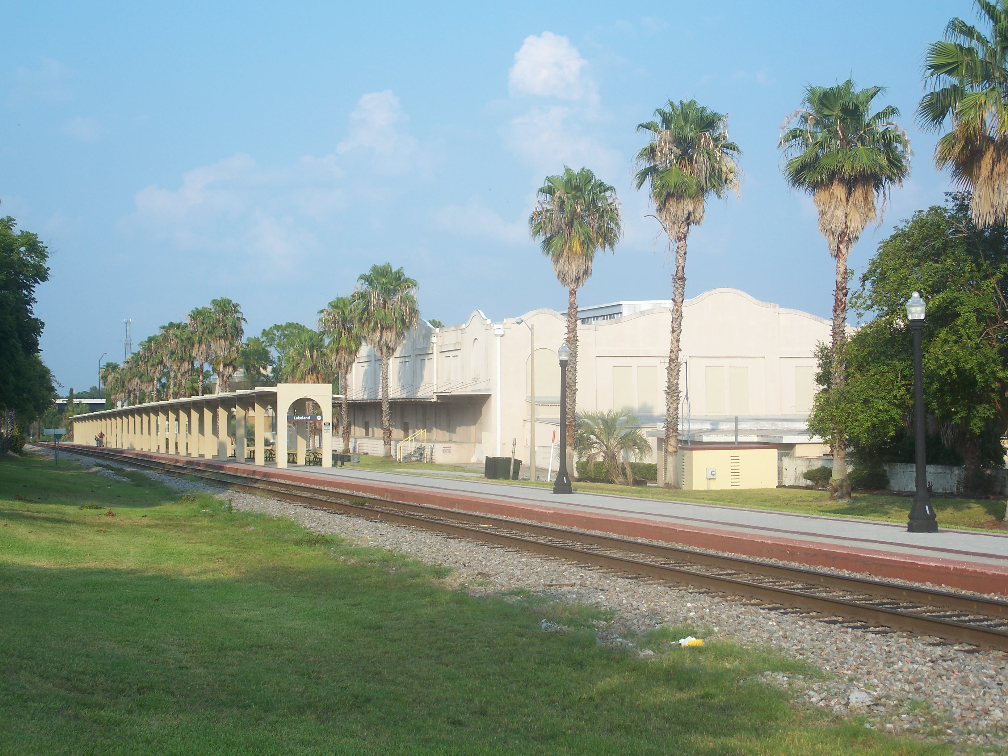 Lakeland: Amtrak station